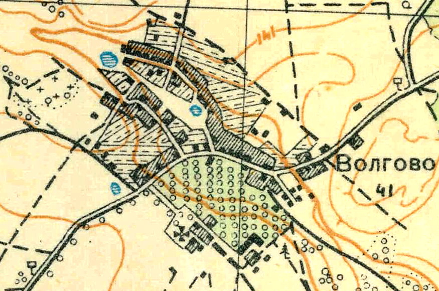 Топографическая карта Ленинградской области, квадрат О-35-24-А-в (Торосово), деревня Волгово